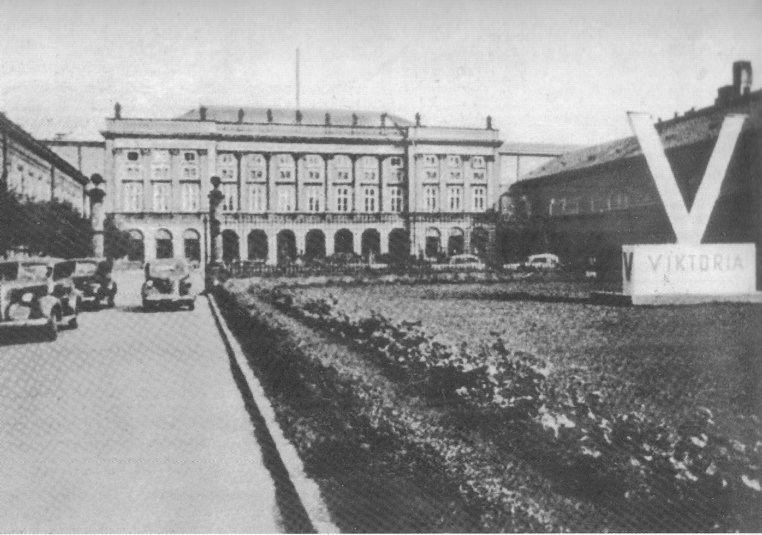 Pałac Namiestnikowski w Warszawie przekształcony na Deutsches Haus